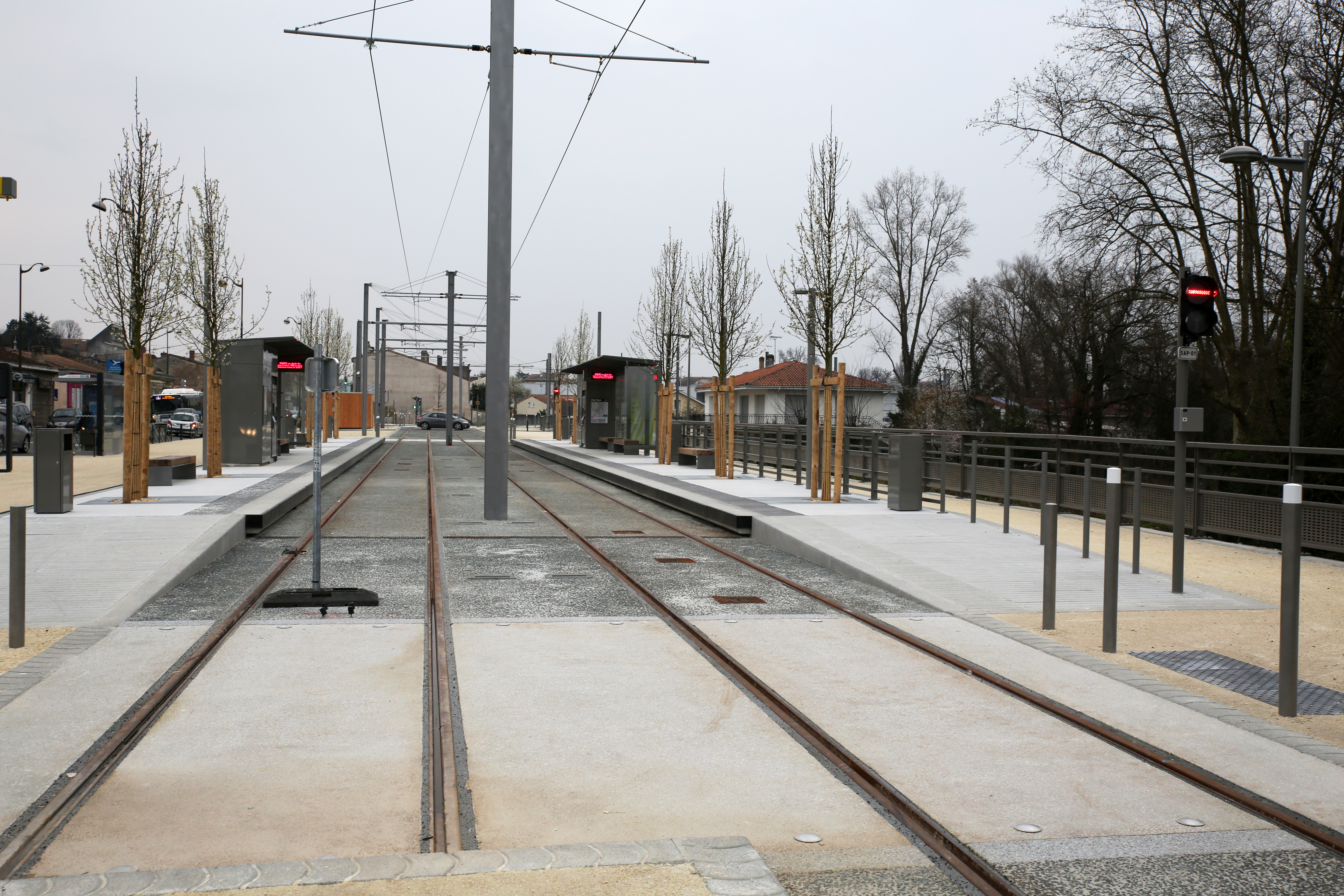 Extension de la ligne C du tramway jusqu'à la station Lycée Václav Havel